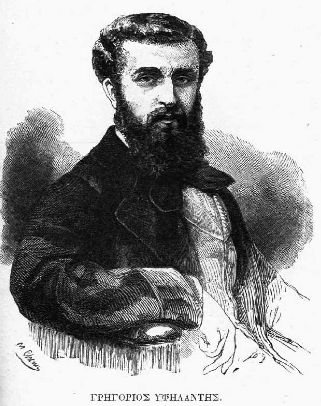 Griechischer Botschafter, 19. Jahrhundert